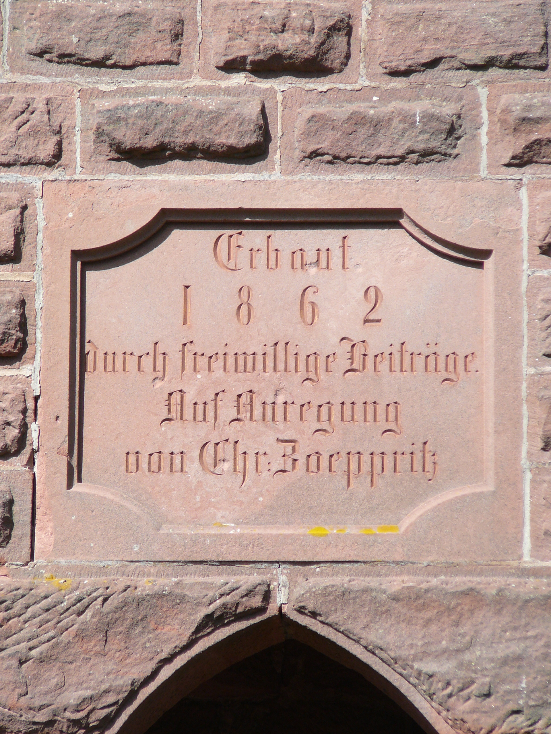 Rehbergturm Inschrift